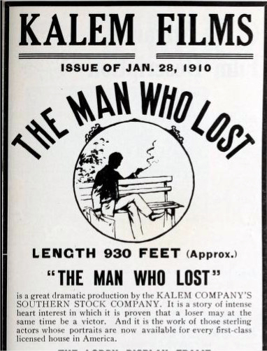 Publicité publiée par le journal professionnel The Film Index, d'un film américain The Man Who Lost, produit par Kalem en Floride et réalisé par Sidney Olcott.